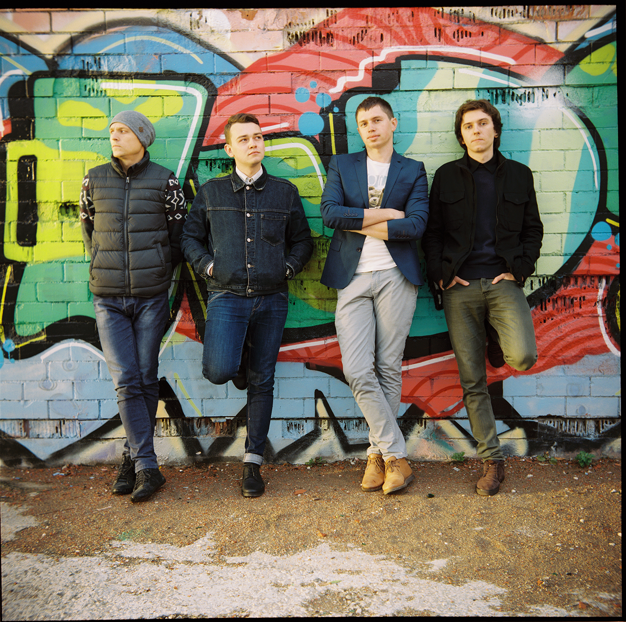 Беларуская (тарашкевіца): Гурт Bristeil у 2014 годзе.